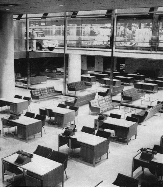 Vista del nivel del entresuelo desde la altura de la planta baja del Anexo Casa Central del Banco Popular Argentino. Esquina de las calles Florida y Cangallo (hoy Tte. Gral. Juan D. Perón).